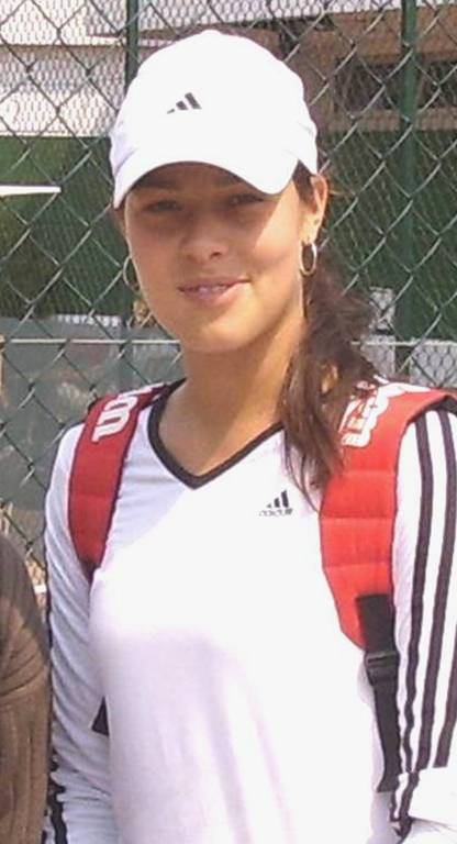 Ana Ivanović